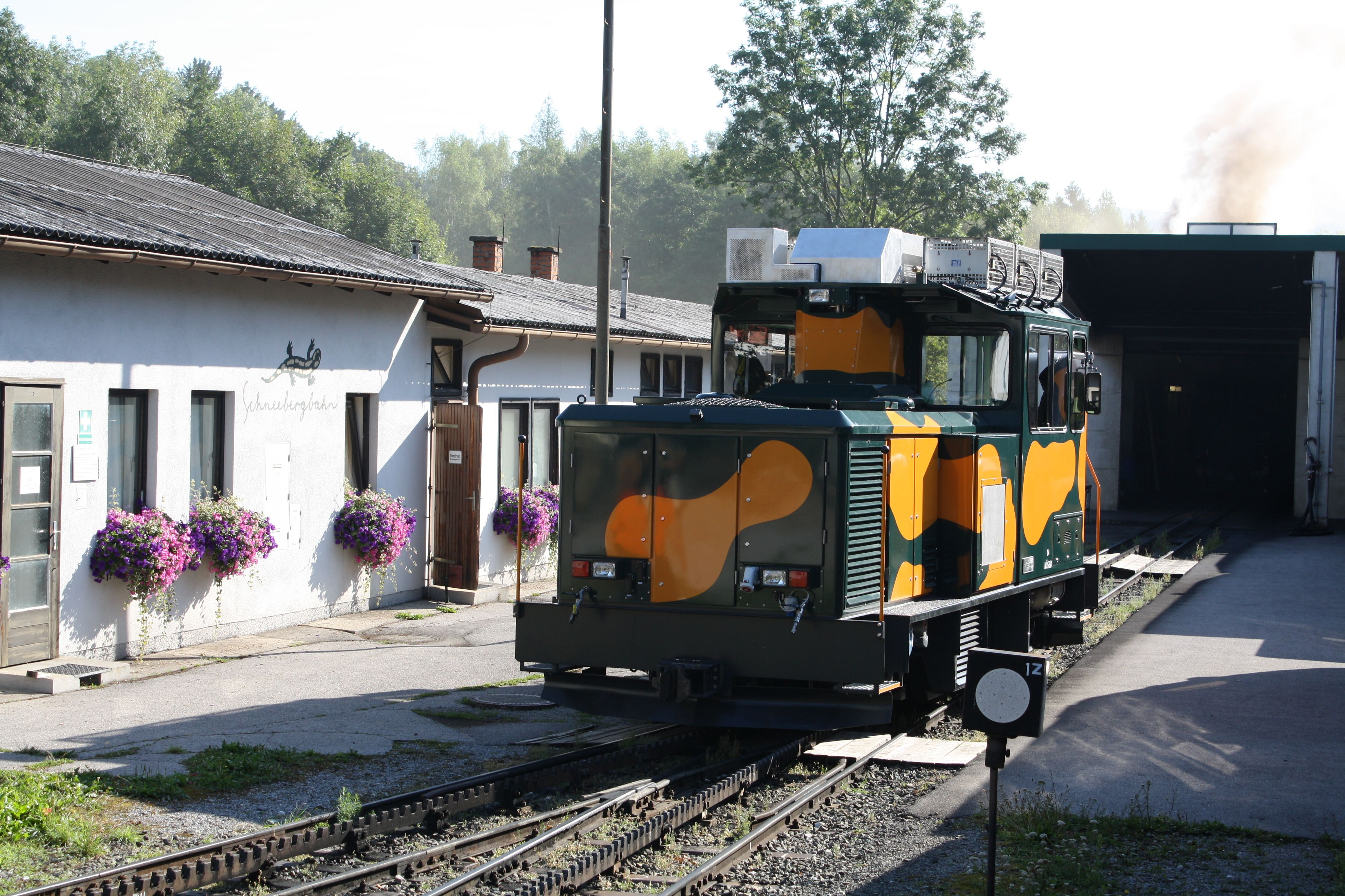 Die Zahnrad-Diesellokomotive Hm 2/2 Nr.14 der Schneebergbahn (NÖSBB), hergestellt von "Stadler rail". Puchberg mit Schneeberg in Niederösterreich